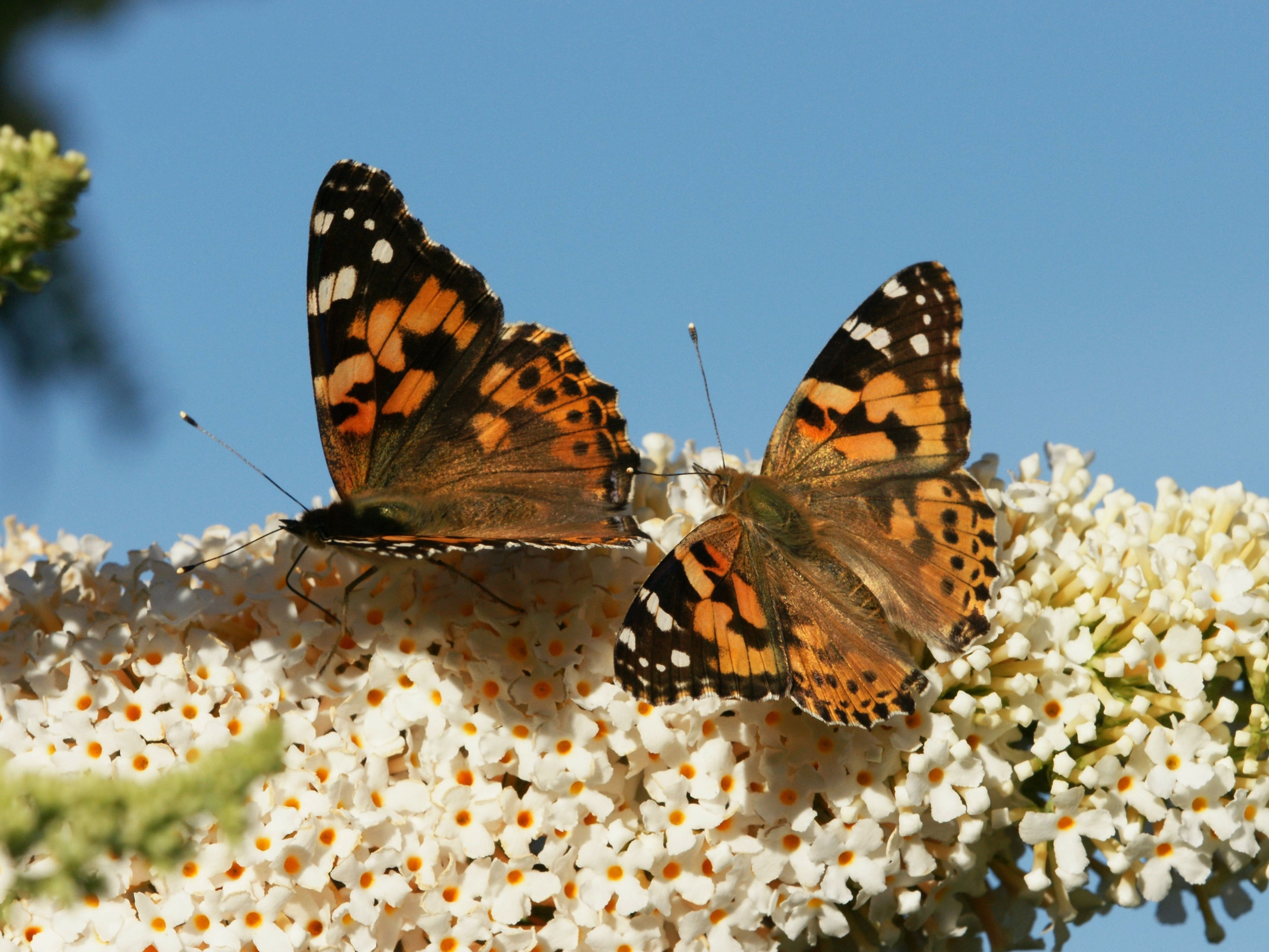 Vanessa cardui, Buddleja davidii